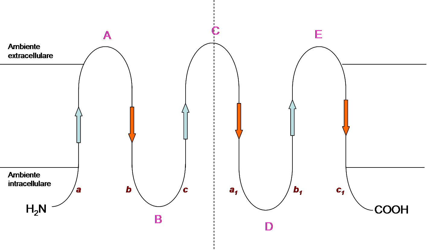 Descrizione grafica della struttura di una singola subunità. Sono ben evidenti i domini proteici.